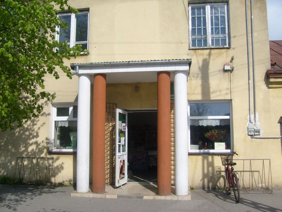 Sklep GS Sch Borki Sklep nr.11 Wola Osowińska.Dawna siedziba Spółdzielni Wolanki.